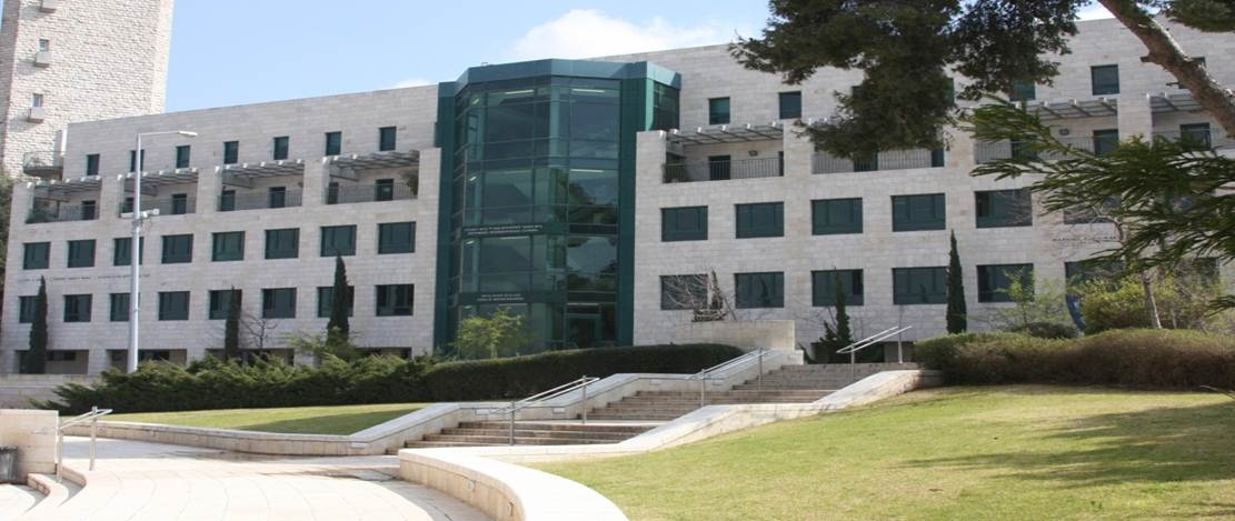 צילום בניין בית הספר לתלמידים מחו"ל ע"ש רוטברג באוניברסיטה העברית קמפוס הר הצופים ירושלים